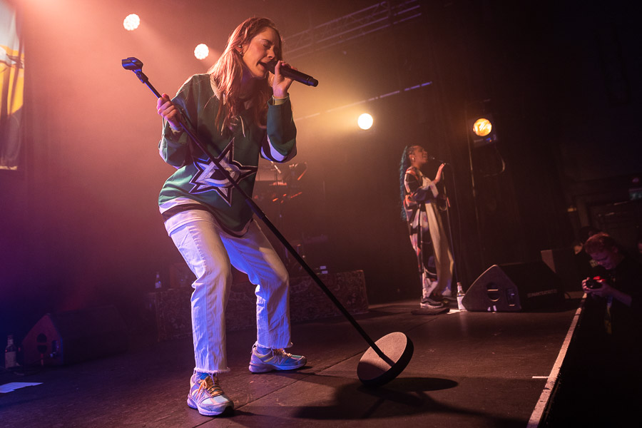 Anna of the North på Parkteatret Scene 22. november 2019.